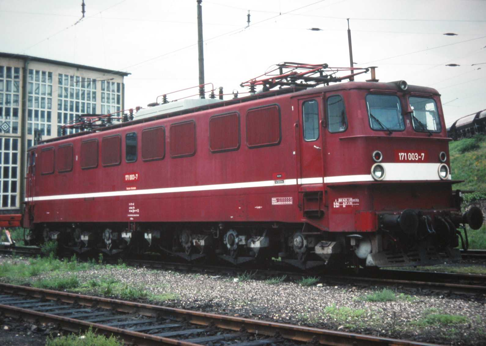 DR 171 003-7 im Bw Blankenburg 1993